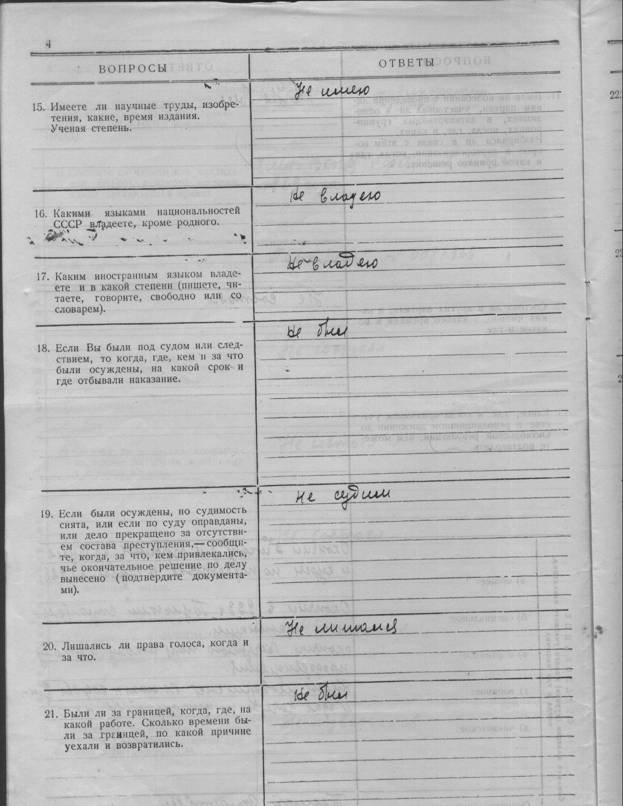 Анкета специального назначения работника НКВД, с. 4, 1940-е гг.